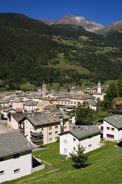 Blick auf Poschiavo